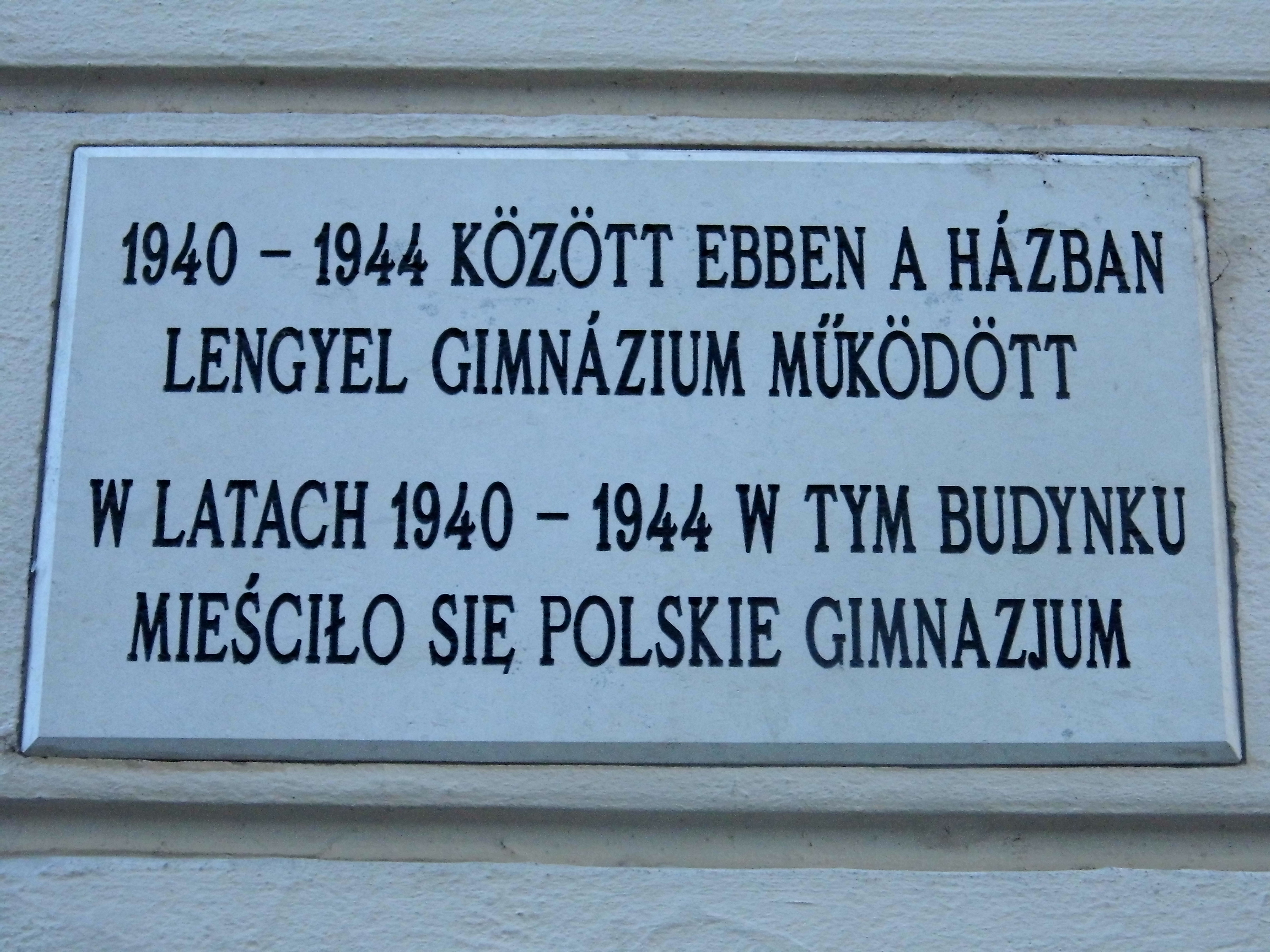 Az egykori egri Lengyel Gimnázium emléktáblája az Érsek ut 3. szám alatt